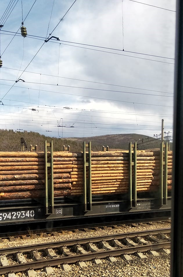 Train with forest at Zabaykalsk station